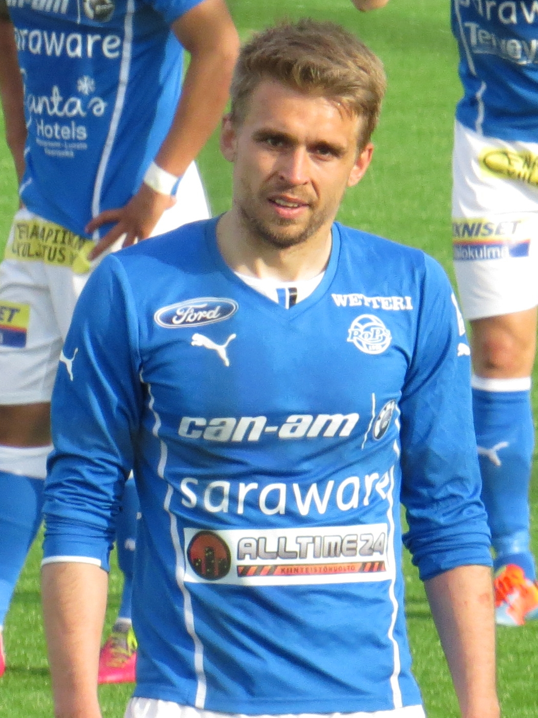 Aleksandr Kokko, suomalais-venäläinen jalkapalloilija Rovaniemen Palloseuran joukkueessa kaudella 2015.